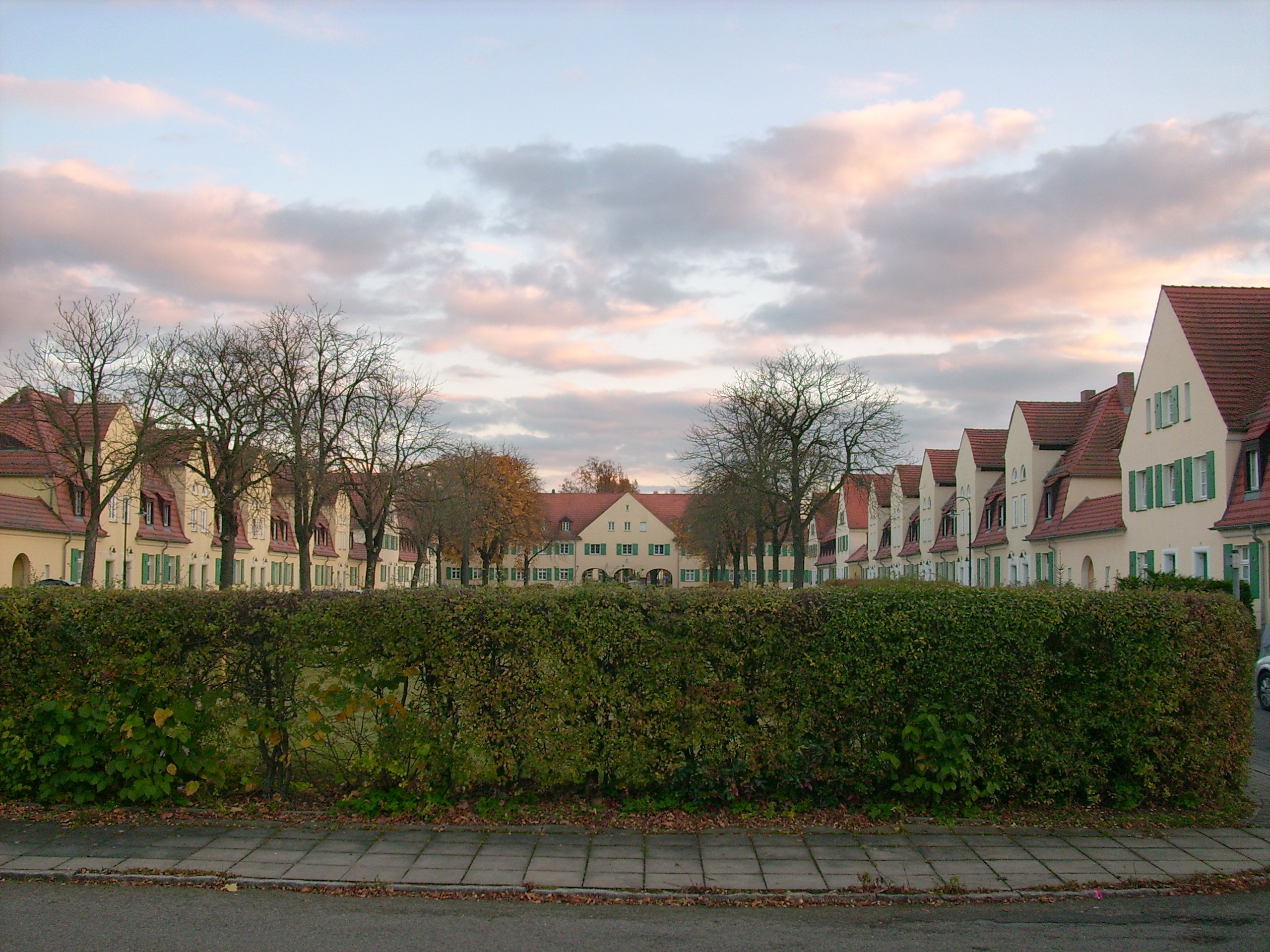 Wohnsiedlung, Schmuckhof in Lauta